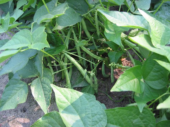 Stamslabonen.